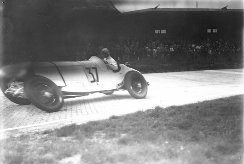 Grosses Internationales Autorennen auf der Avus in Berlin! Kein Autounglück, sondern Rudolf Carracciola auf Mercedes-Benz im 150 km.-Tempo auf der Avus beim Training. photographiert.